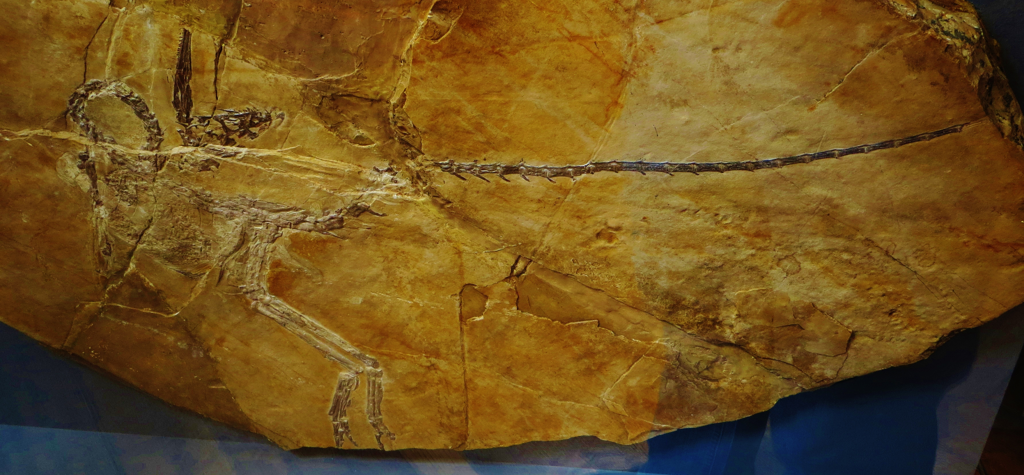 Fossil of Compsognathus, an extinct reptile- Took the photo at Musee d'Histoire Naturelle, Paris